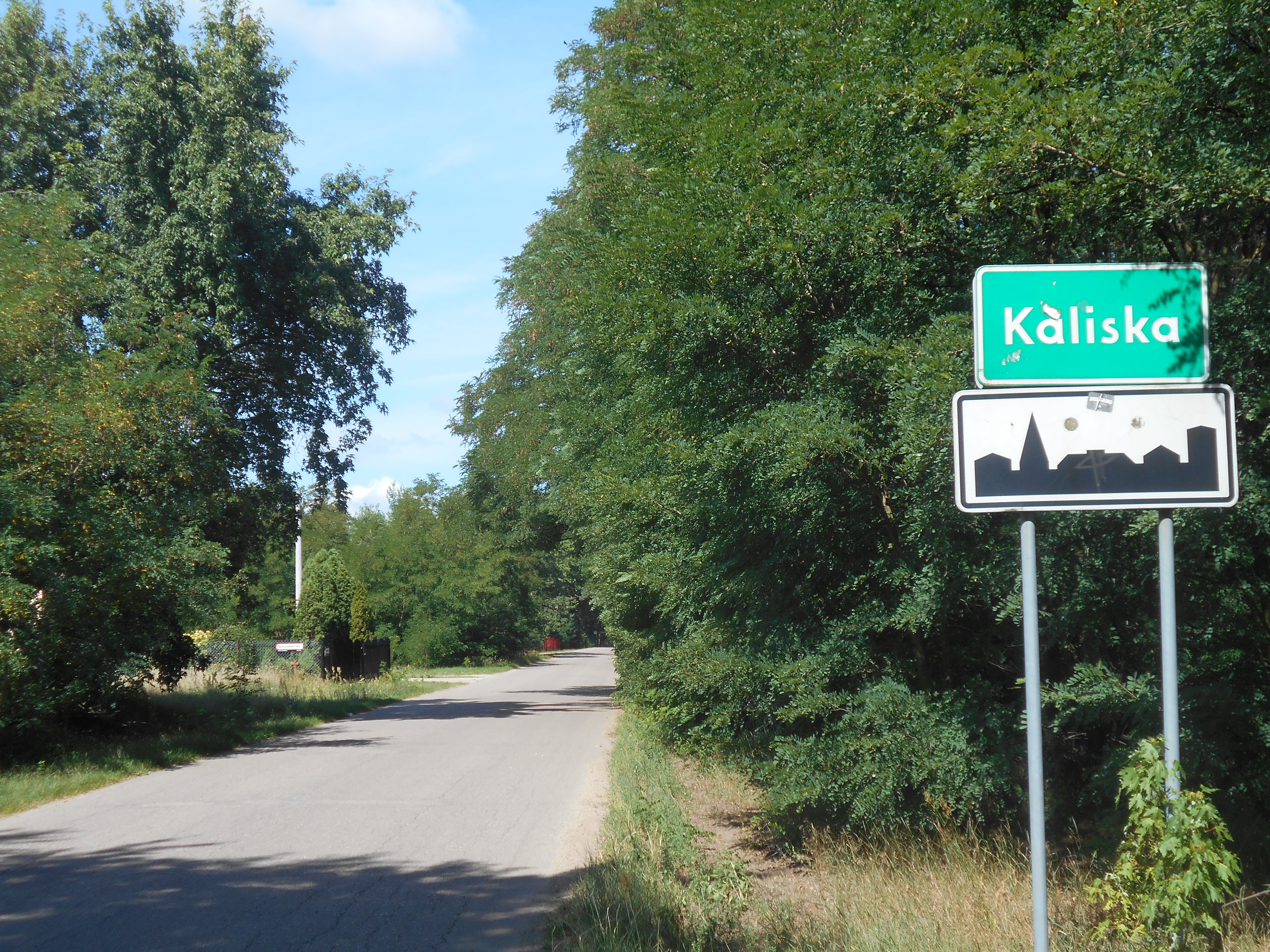 Miejscowość w gminie Łochów